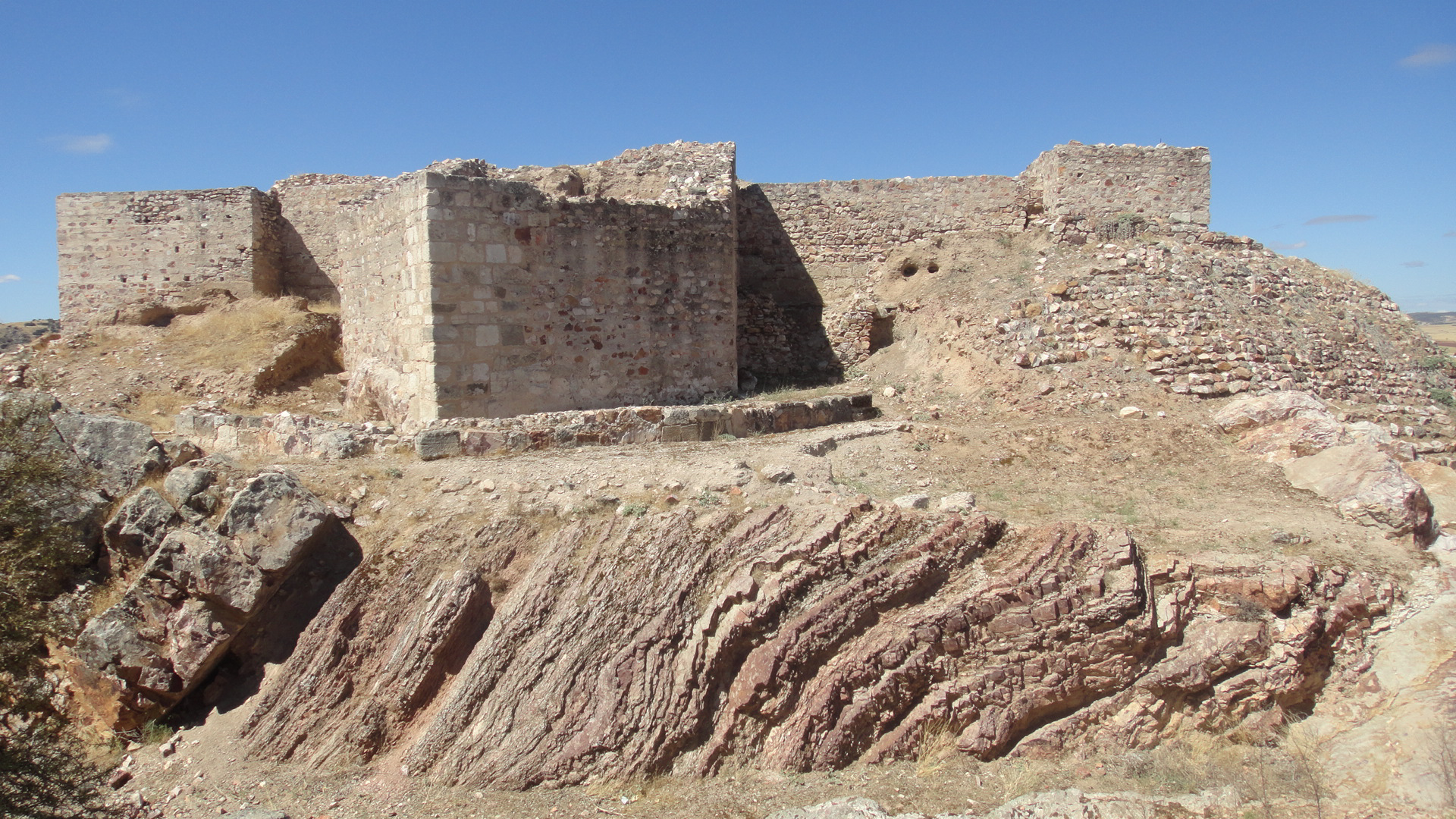 Castillo de Alarcos en la Provincia de Ciudad Real (Castilla-La Mancha - España). Torre pentagonal en forma de proa, con foso, para la defensa de la fachada este. Mandado construir por Alfonso VIII, quedando inconcluso en 1195, por la Batalla de Alarcos.